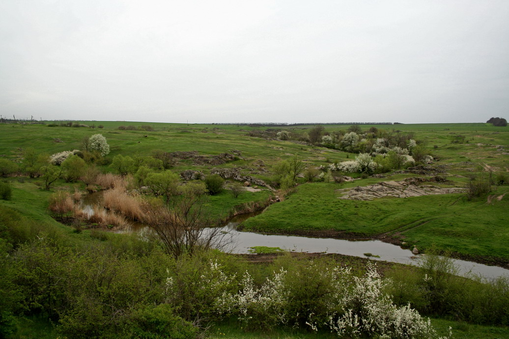 Mertvovod river